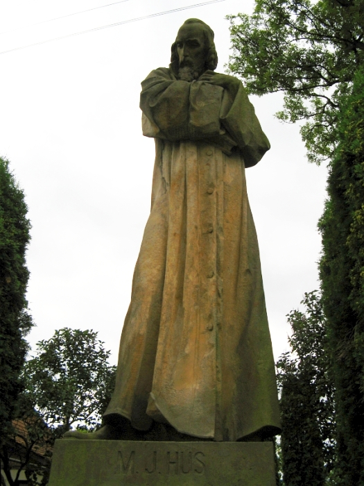 Socha Mistra Jana Husa, střed obce, Dobříkov.